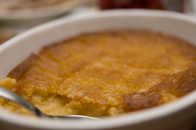 Jouluruokaa. Äiti teki.